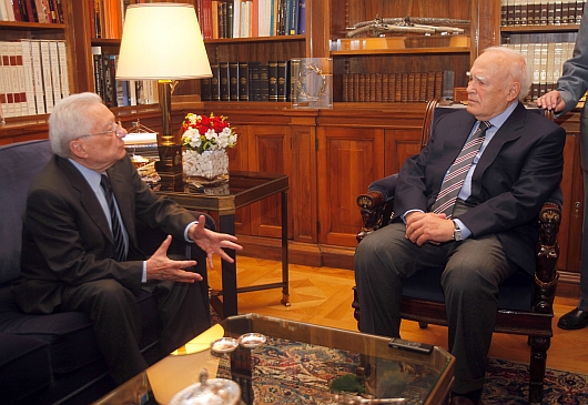 Διάλογος του Προέδρου της Δημοκρατίας κ. Κάρολου Παπούλια με τον Υπουργό Εξωτερικών κ. Πέτρο Μολυβιάτη